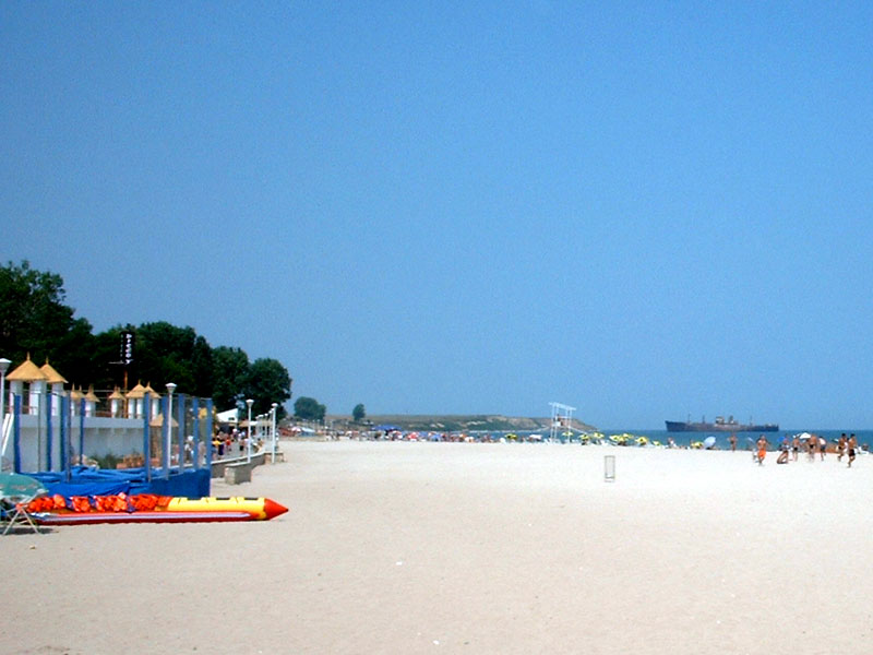 mare13